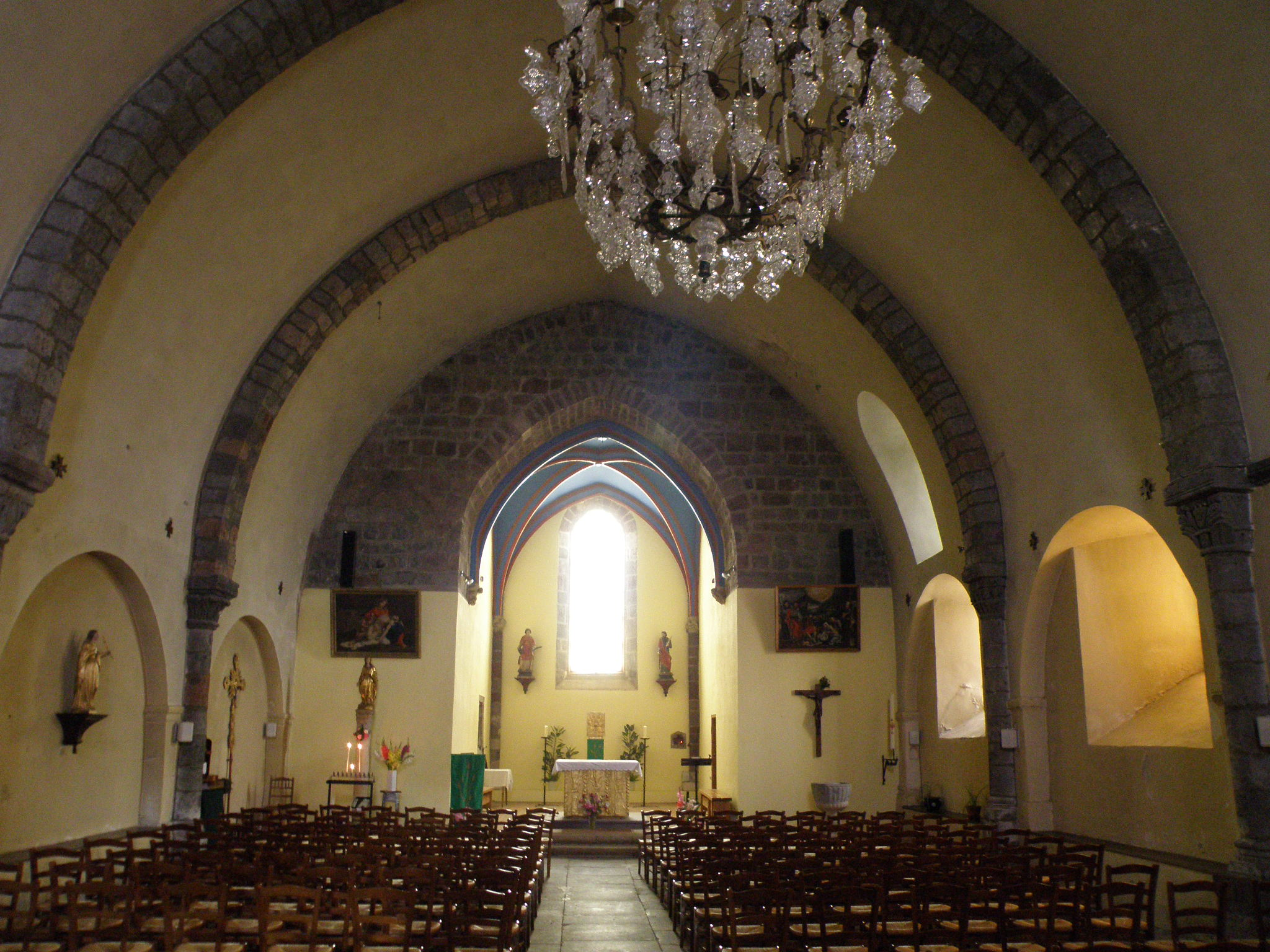 Solignac-sur-Loire, comm. de la Haute-Loire, France (région Auvergne). Église Saint-Vincent, nef vue depuis l'entrée (coup d'oeil vers l'est) ; au fond : le choeur.